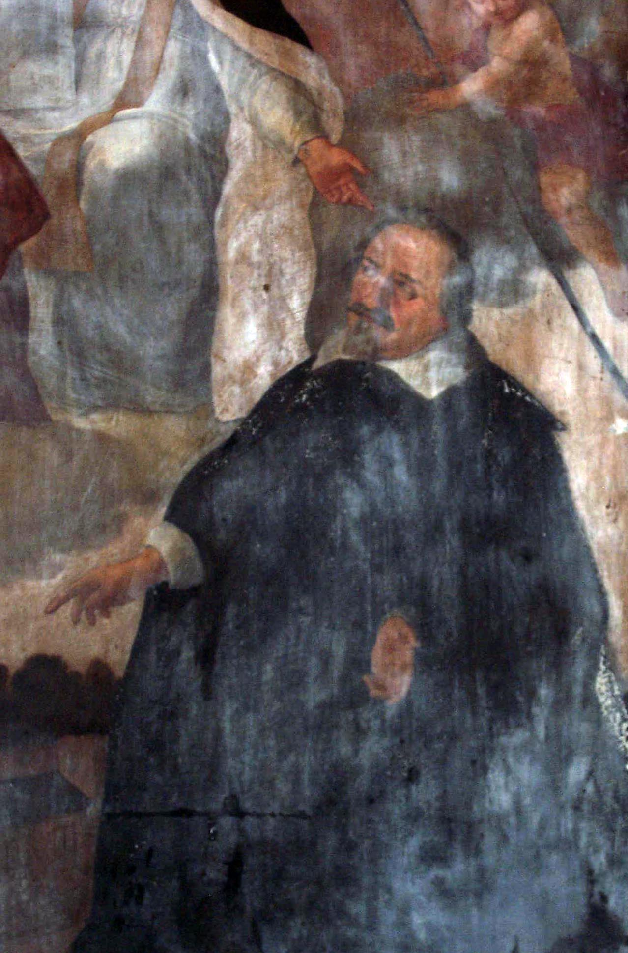 Abbildung von Santino Solari auf seiner Gruft am Salzburger Friedhof St. Peter. Fotografie des Grabmals von Santino Solari, errichtet um 1646.